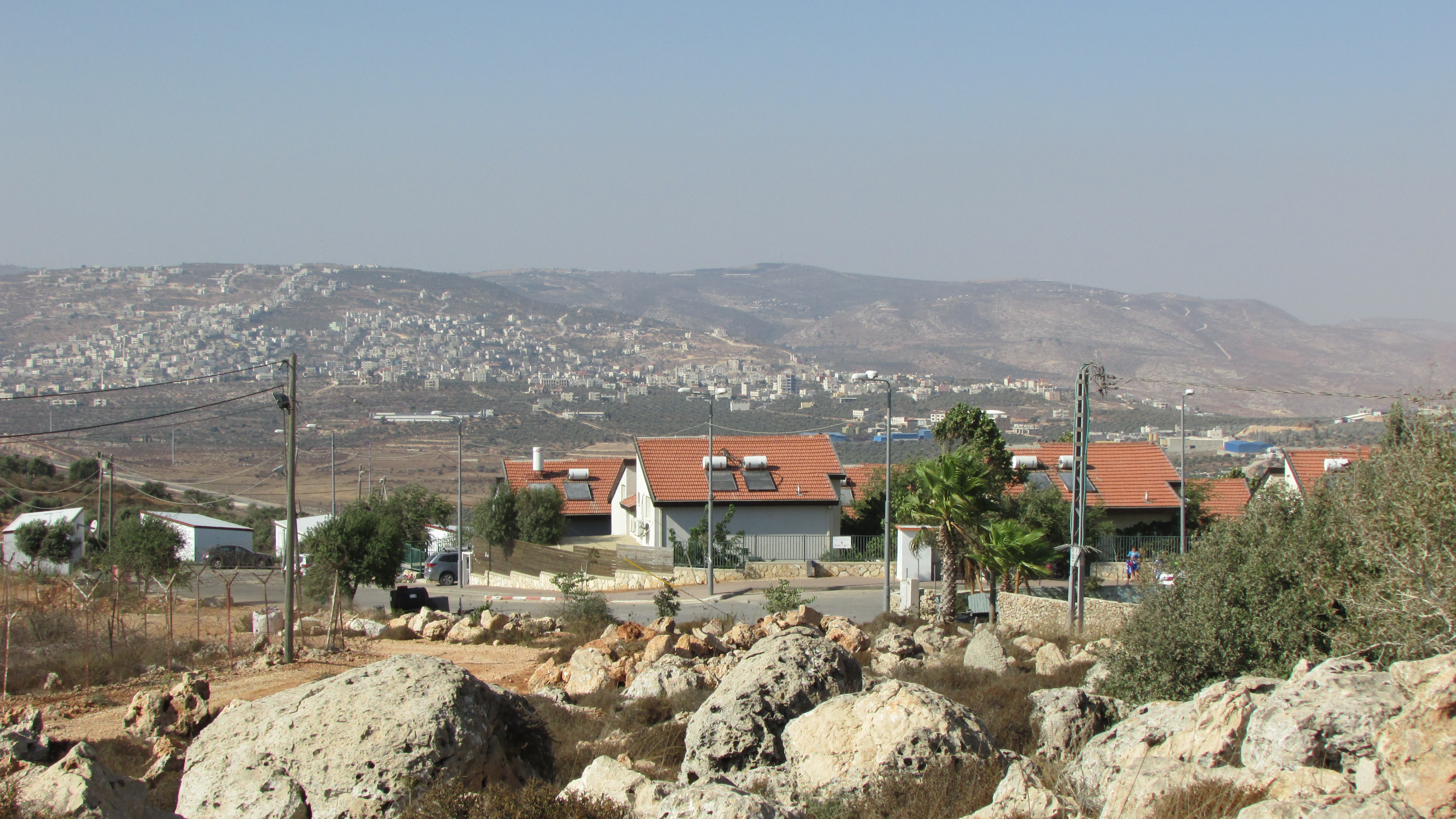 Migdalim